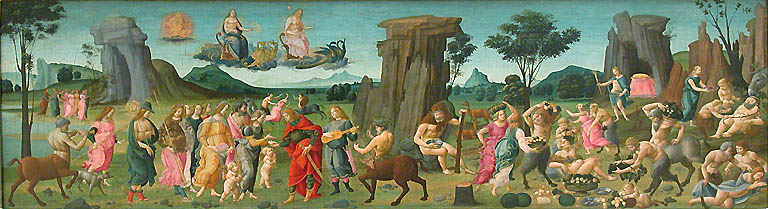 Noces de Thétis et Pelée